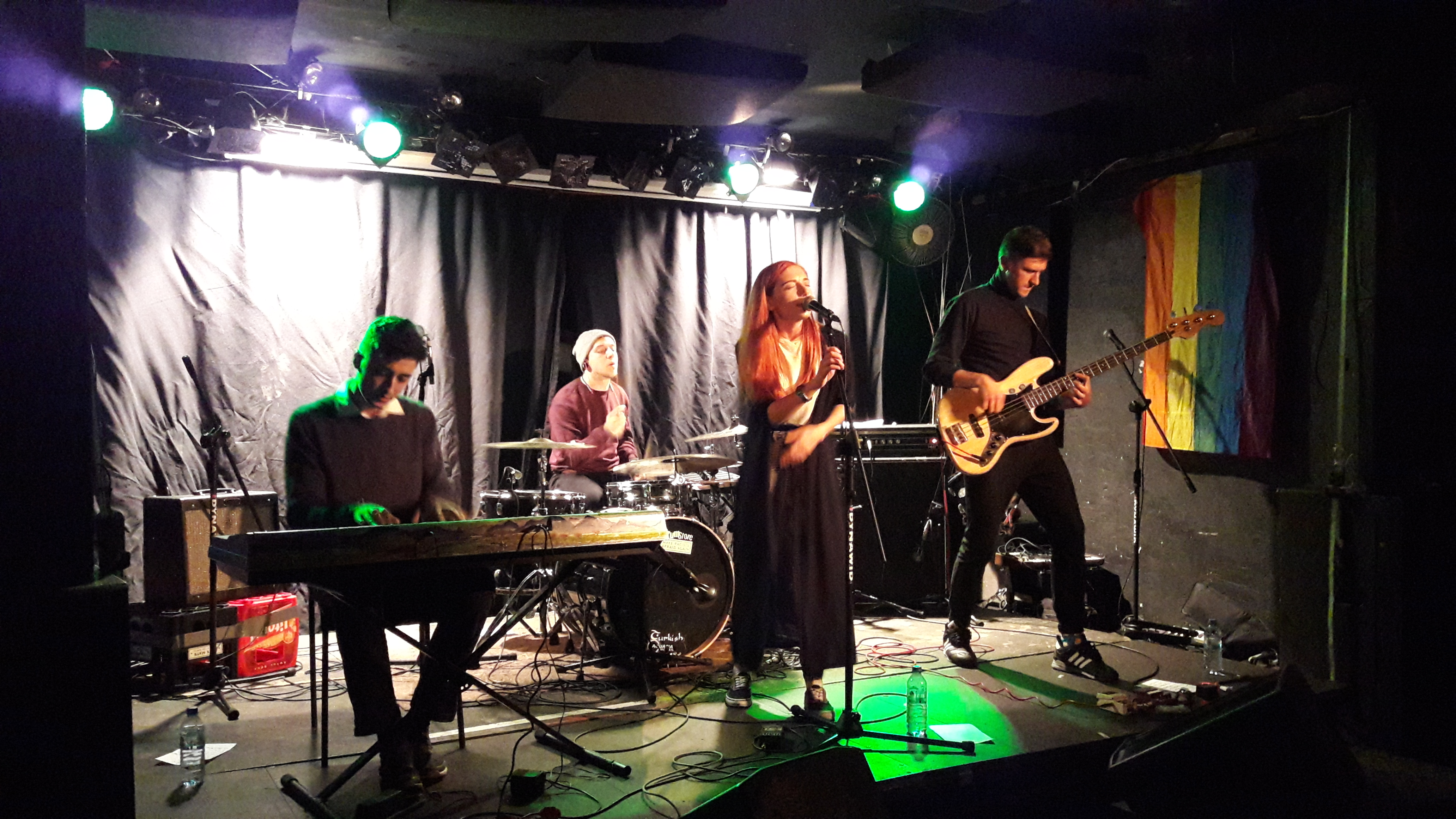 Koncert „Solidarni z Białorusią” 24 października 2018 roku w klubie Pogłos w Warszawie. Występuje zespół Kolir z Odessy.